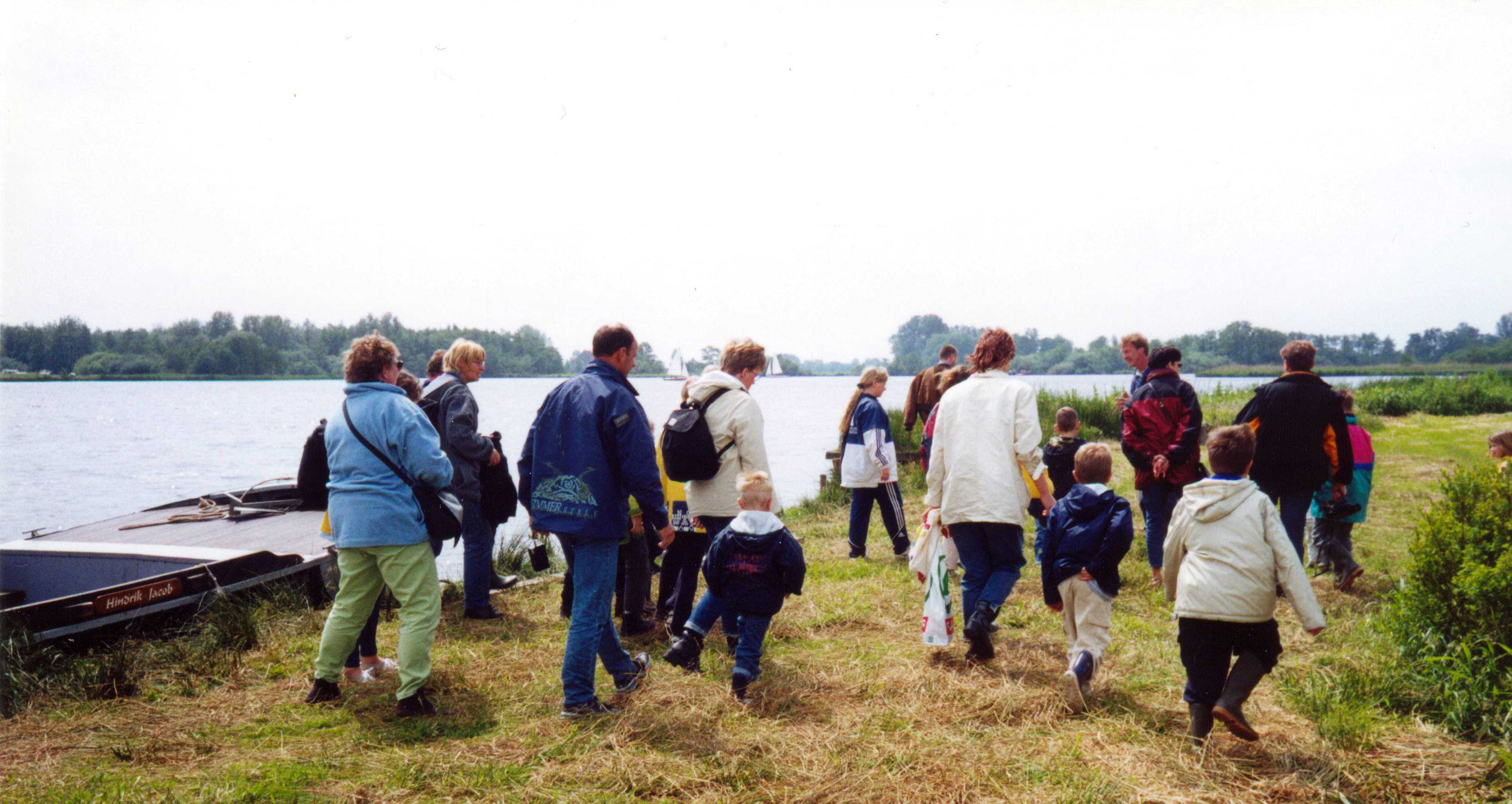 Kameleondorp in Terherne/Terhorne, Netherlands